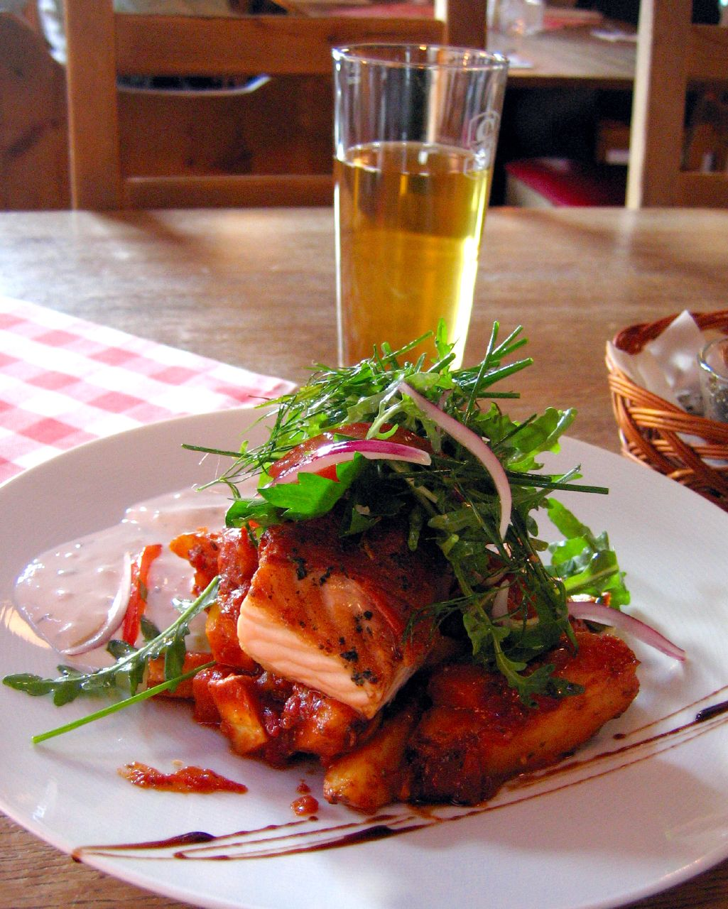 Grillad parmaskinks-inlindad laxrygg (grilled salmon with prosciutto) at Hemma Hos, Göteborg, Sweden